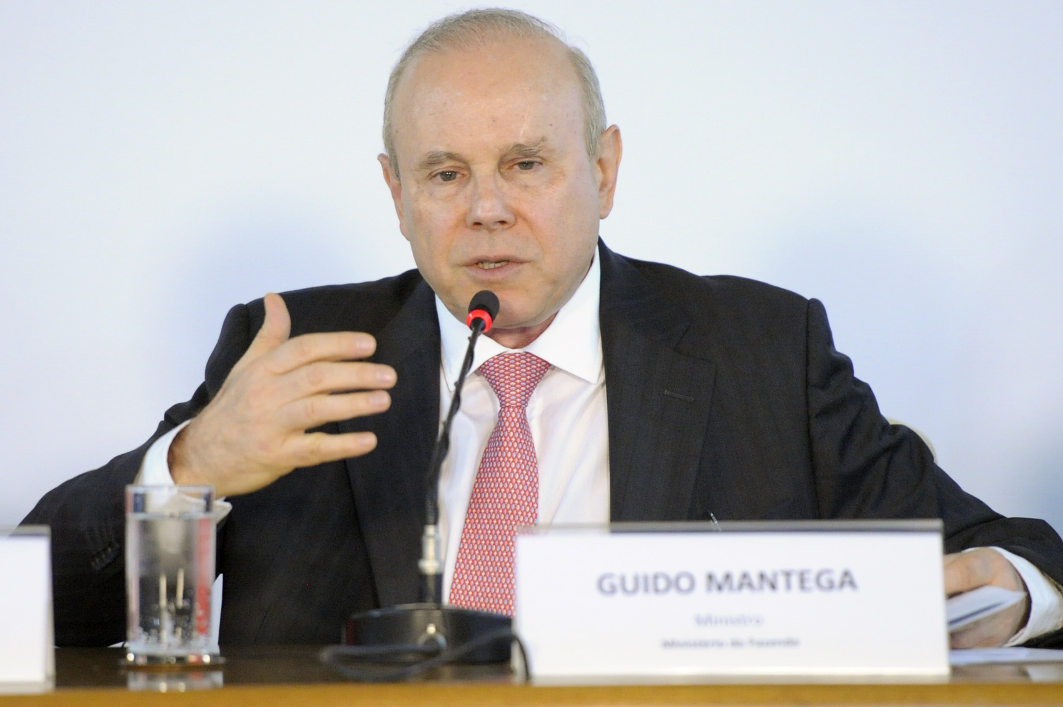 A ministra do Planejamento, Miriam Belchior, e o ministro da Fazenda, Guido Mantega (foto), concedem coletiva à imprensa no auditório do Ministério do Planejamento. Para 2015, o salário mínimo será de R$ 788,06, valor 8,8% superior. A previsão de crescimento do Produto Interno Bruto (PIB) é de 3% e a meta de inflação (IPCA) de 5%. Os dados constam do Projeto de Lei Orçamentária Anual para o próximo ano (PLOA 2015), entregue nesta quinta-feira (28) ao Congresso Nacional. Foto: Edilson Rodrigues/Agência Senado